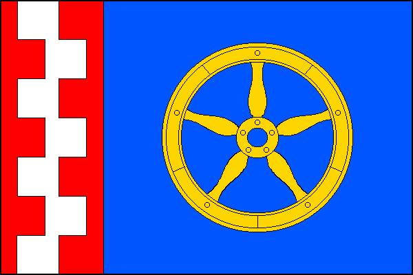 Vlajka obce Popelín